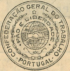 Logótipo da Confederação Geral do Trabalho (Portugal)